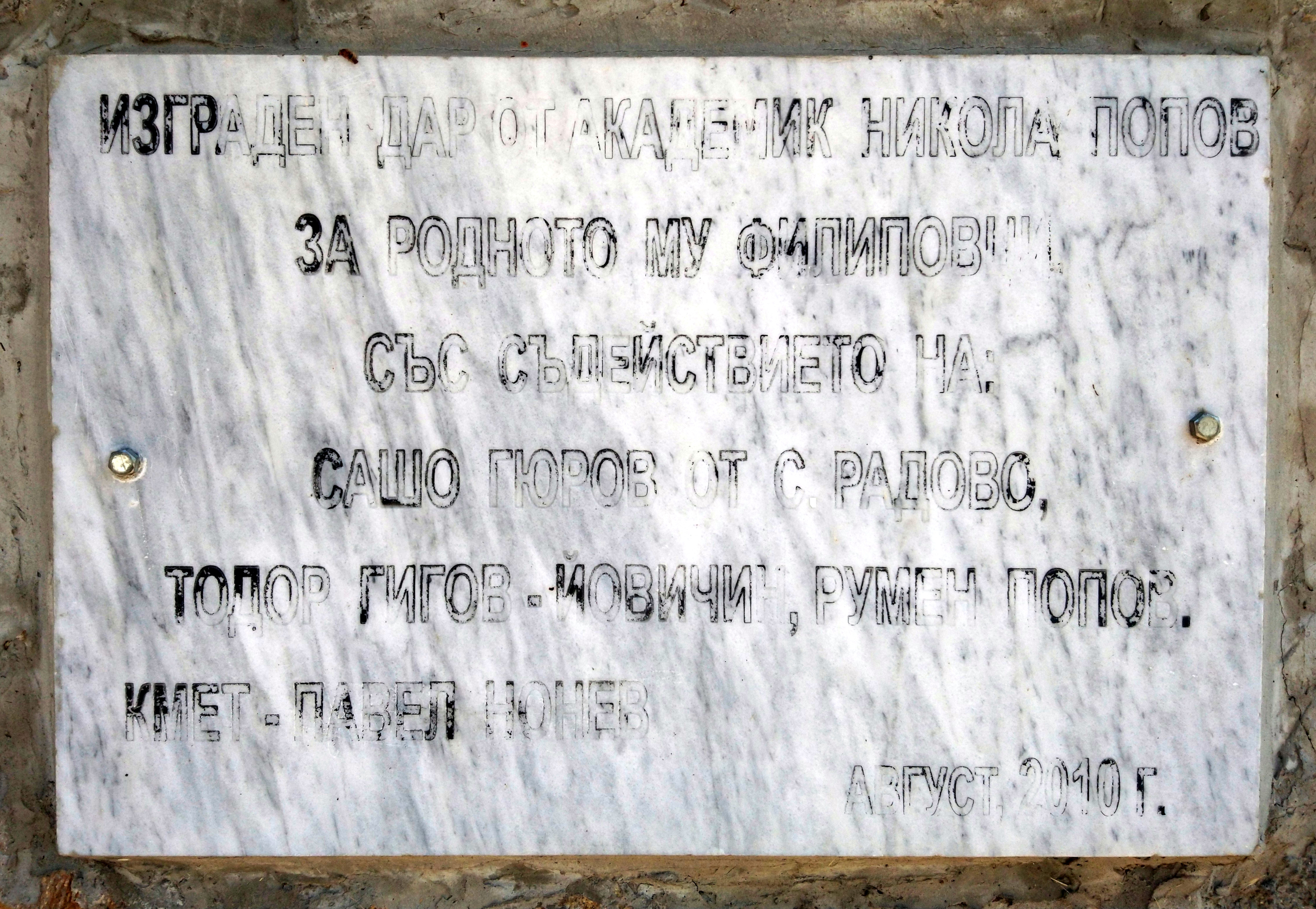 Плоча на чешмата в село Филиповци, построена от академик Никола Попов